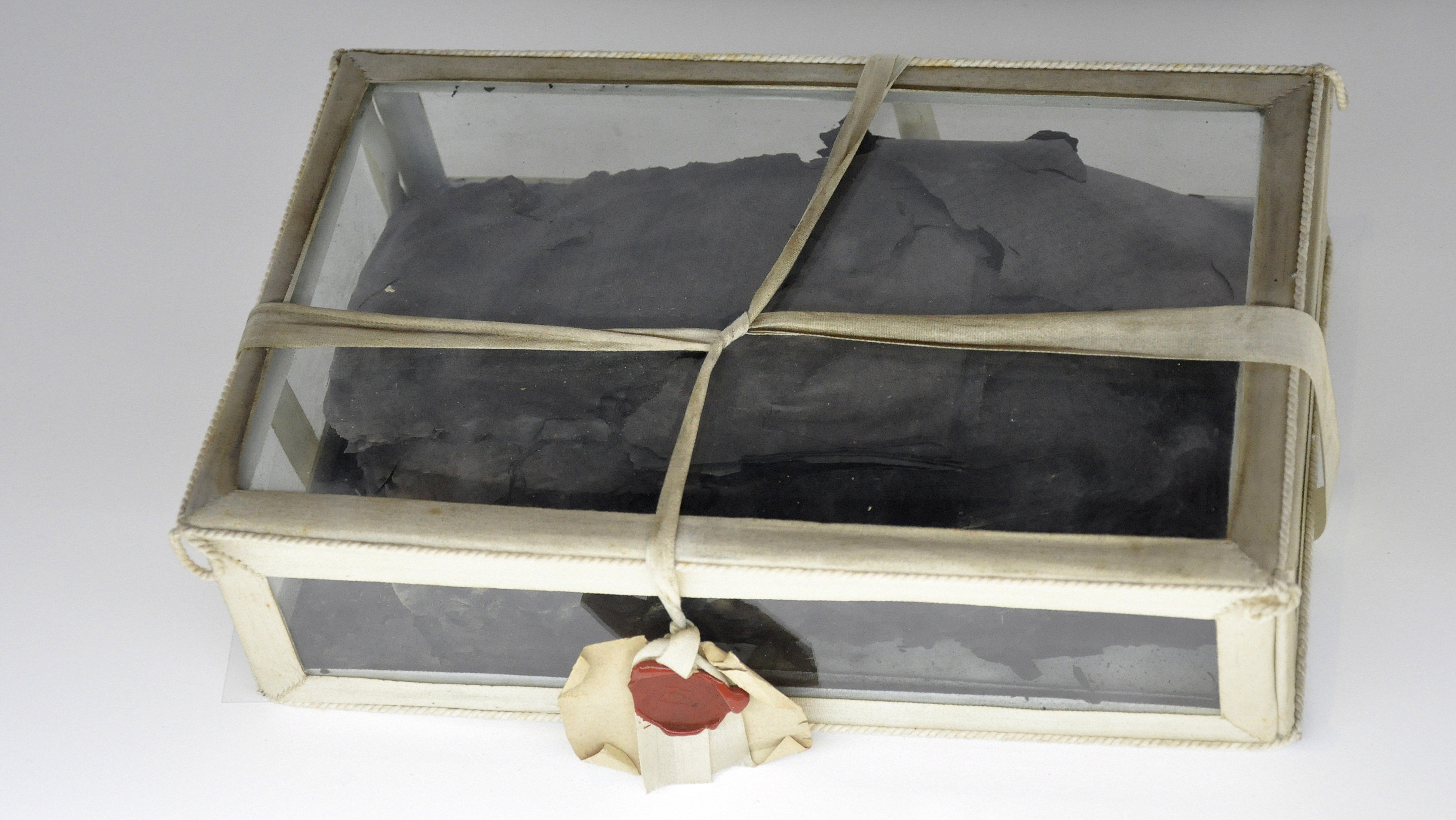 Resten boek bibliotheekbrand Leuven 29-8-1914 - Kon. Museum Leger Krijgsgeschiedenis Brussel This photo of movable heritage has been taken in the Brussels Capital Region